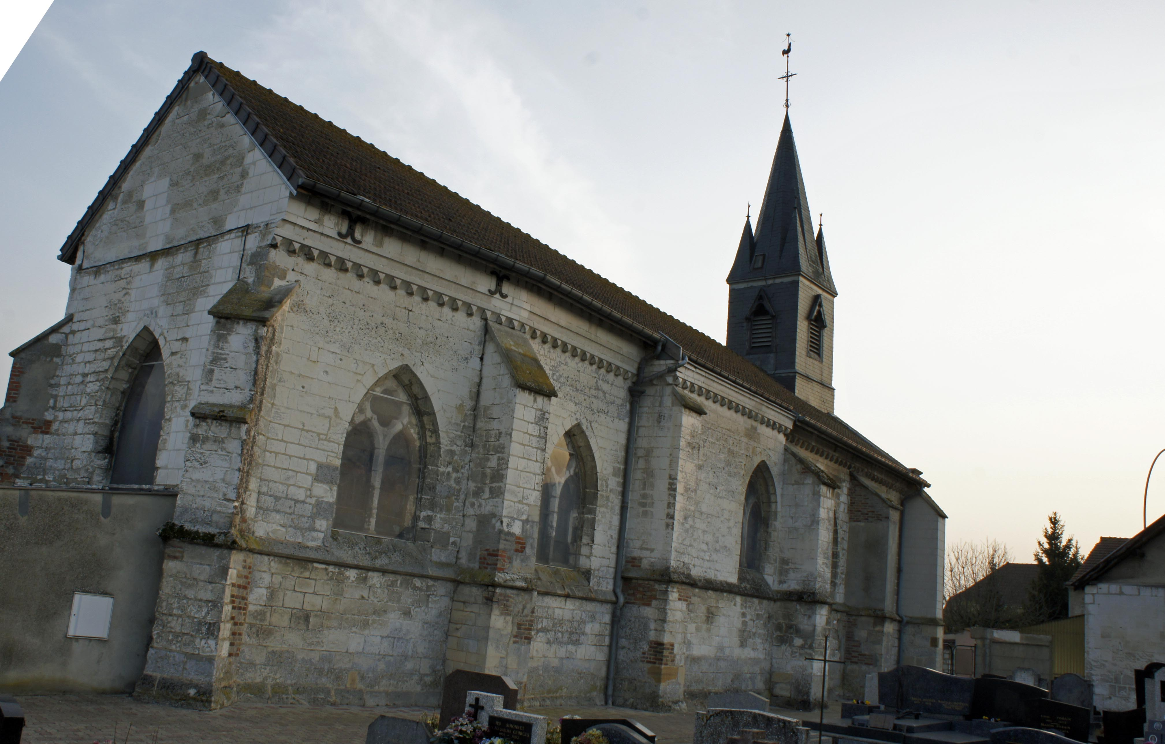 Église et cimetière à Compertrix.